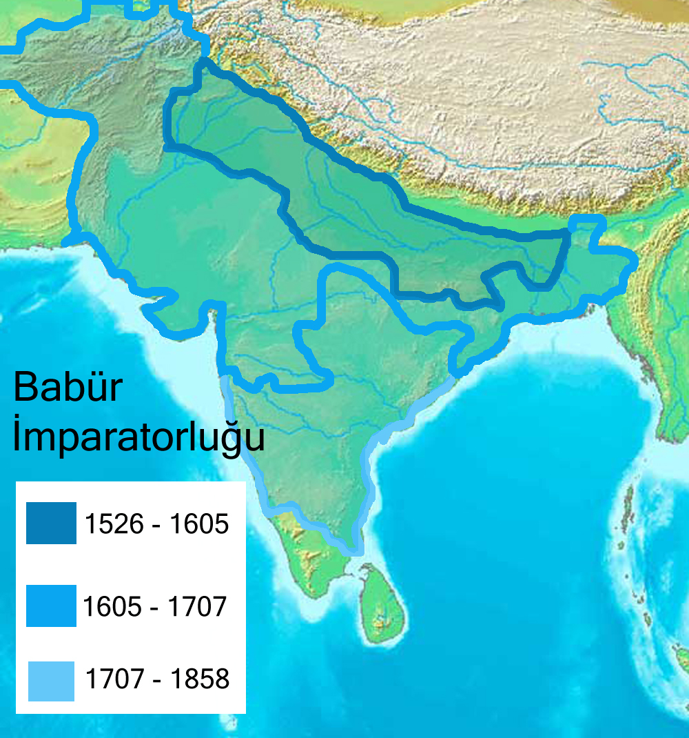 Babür İmparatorluğu'na dair bir harita.